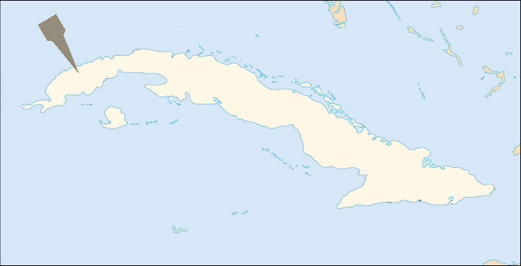 Valle de Viñales op der Kuba-Kaart